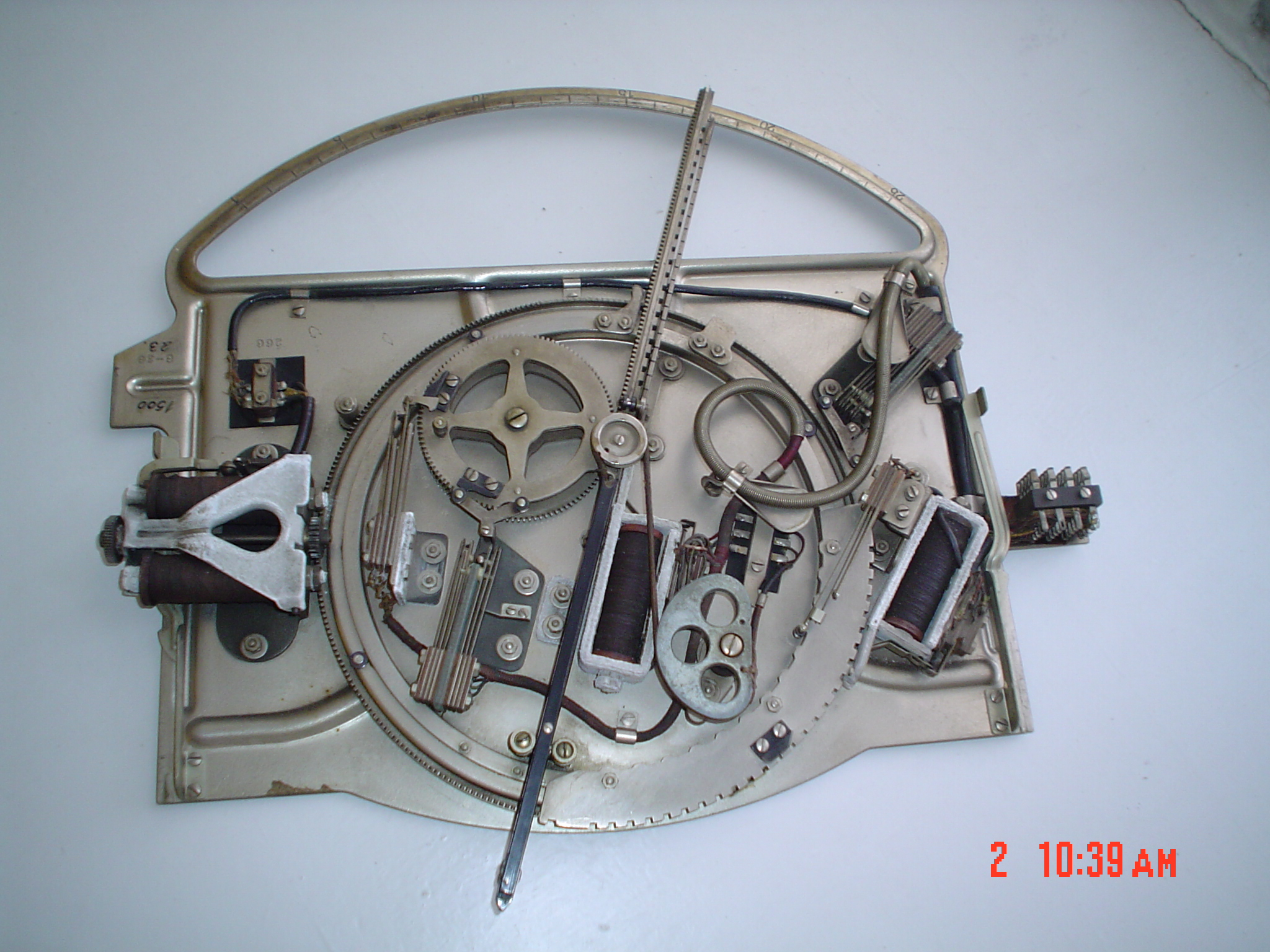 Maŝino_de_Ericsson.